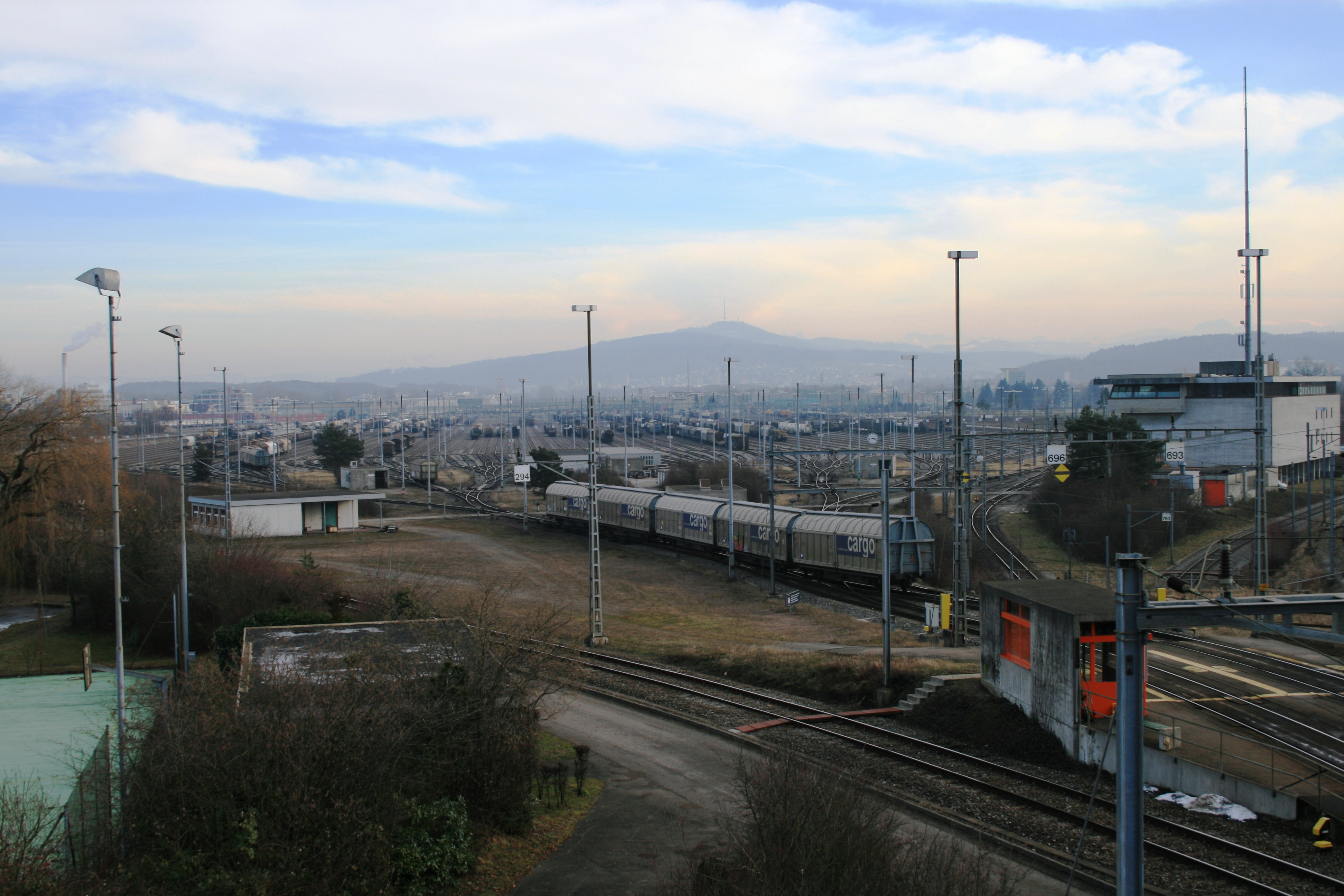 Rangierbahnhof Limmattal (Gemeinde Spreitenbach AG)